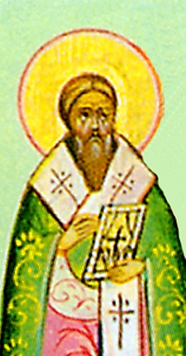 Visão parcial do ícone de São Trifão